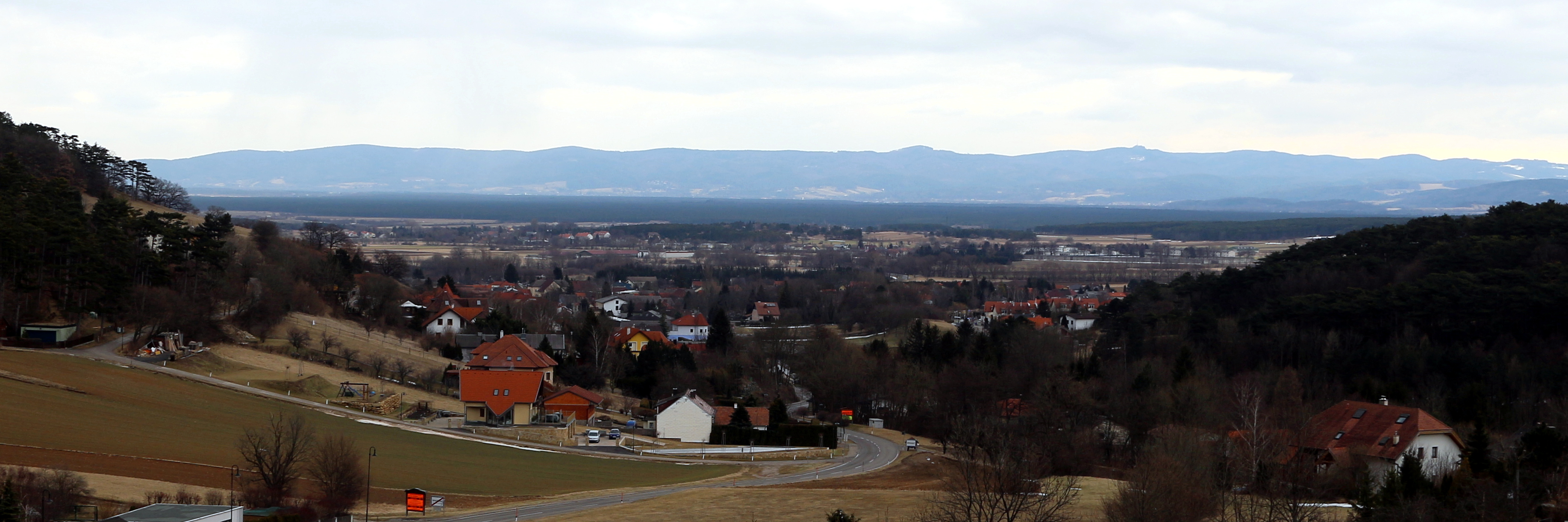 Ortsansicht Willendorf, Blickrichtung Osten. Im Hintergrund das Leithagebirge.